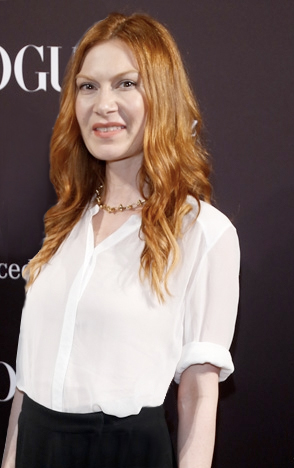 Vogue Fashion Night Berlin Juli 2013